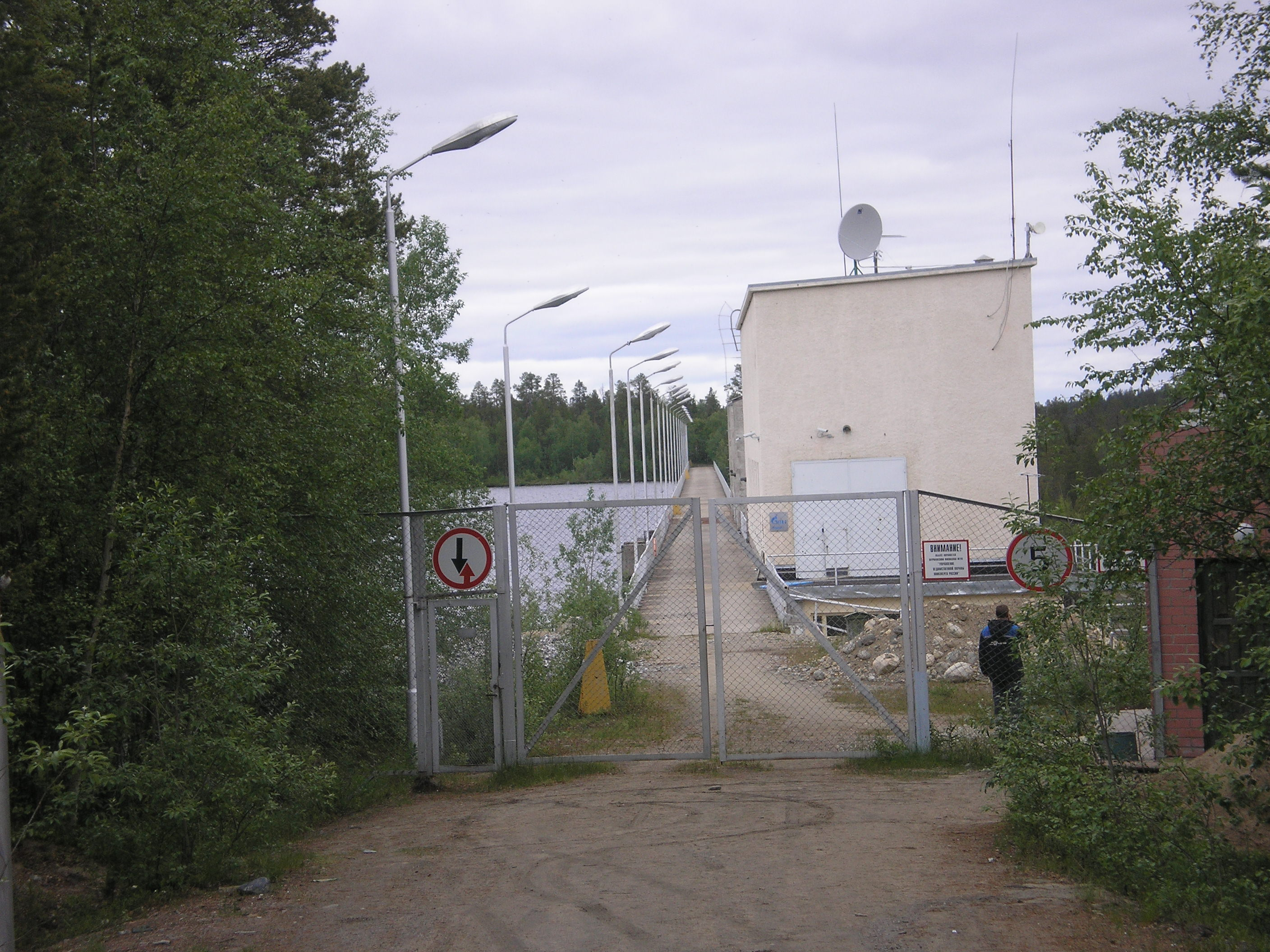 Раякоски ГЭС 2010